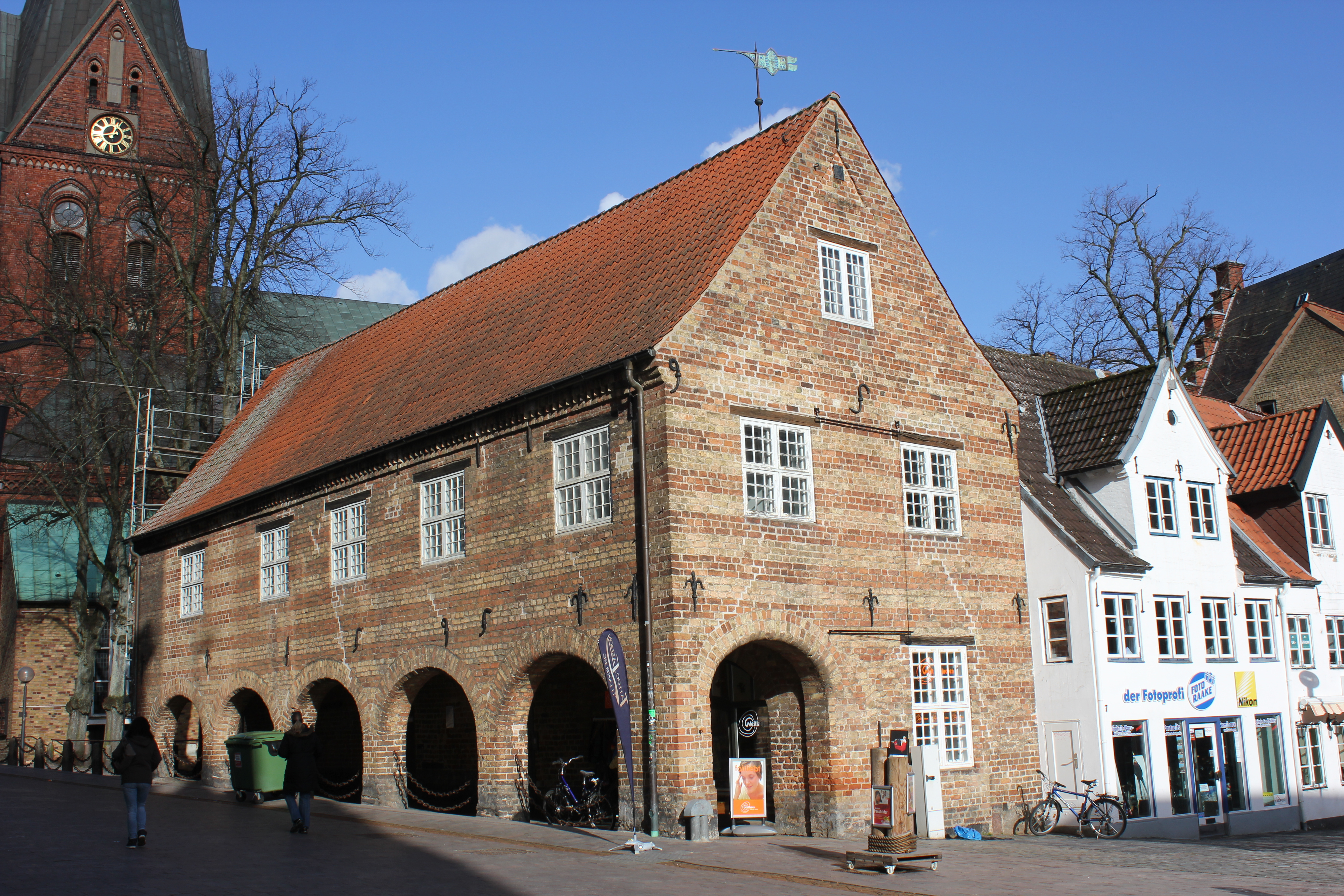 Flensburger Schrangen, Bild 04